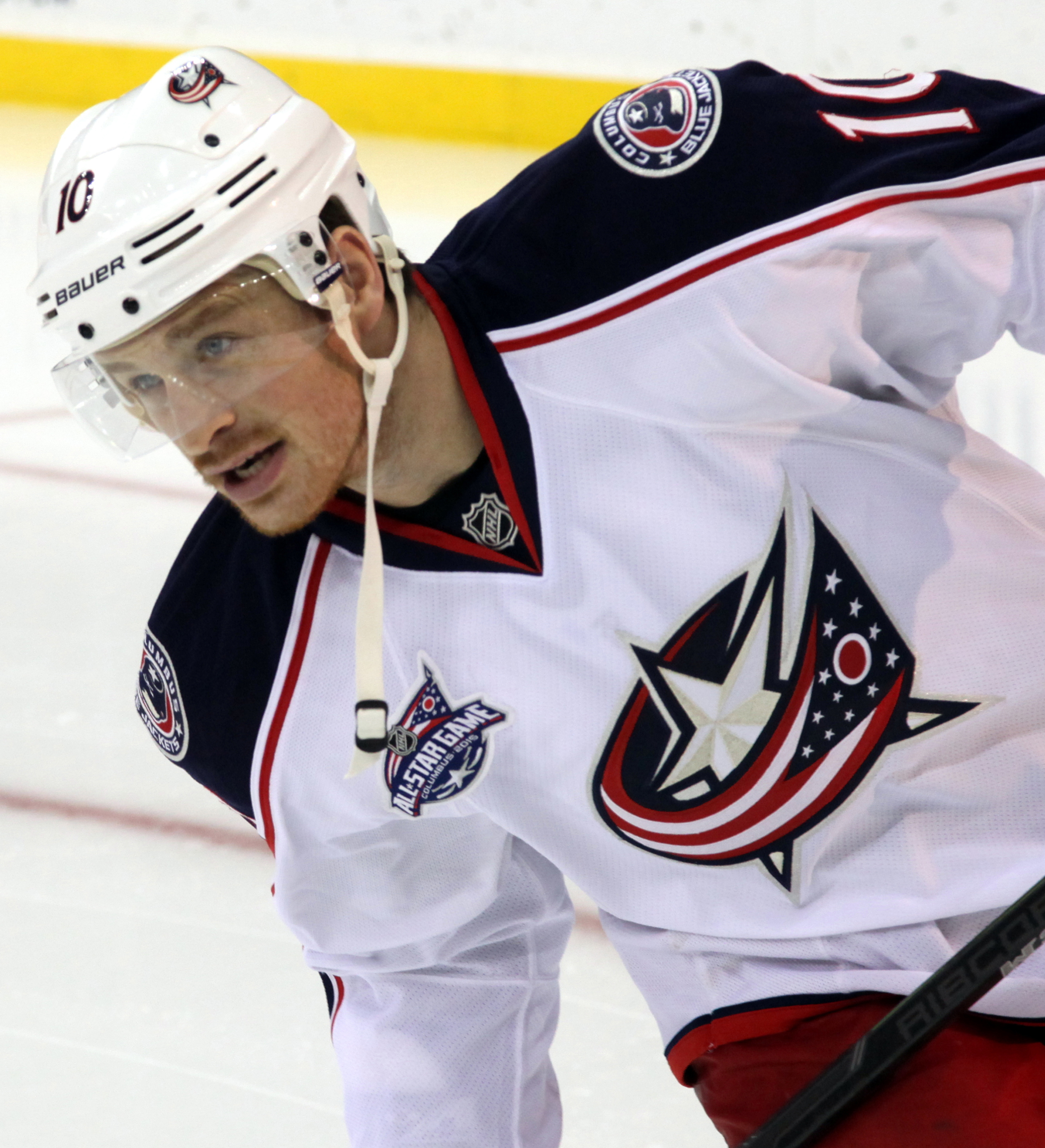 Jack Skille in November 2014.